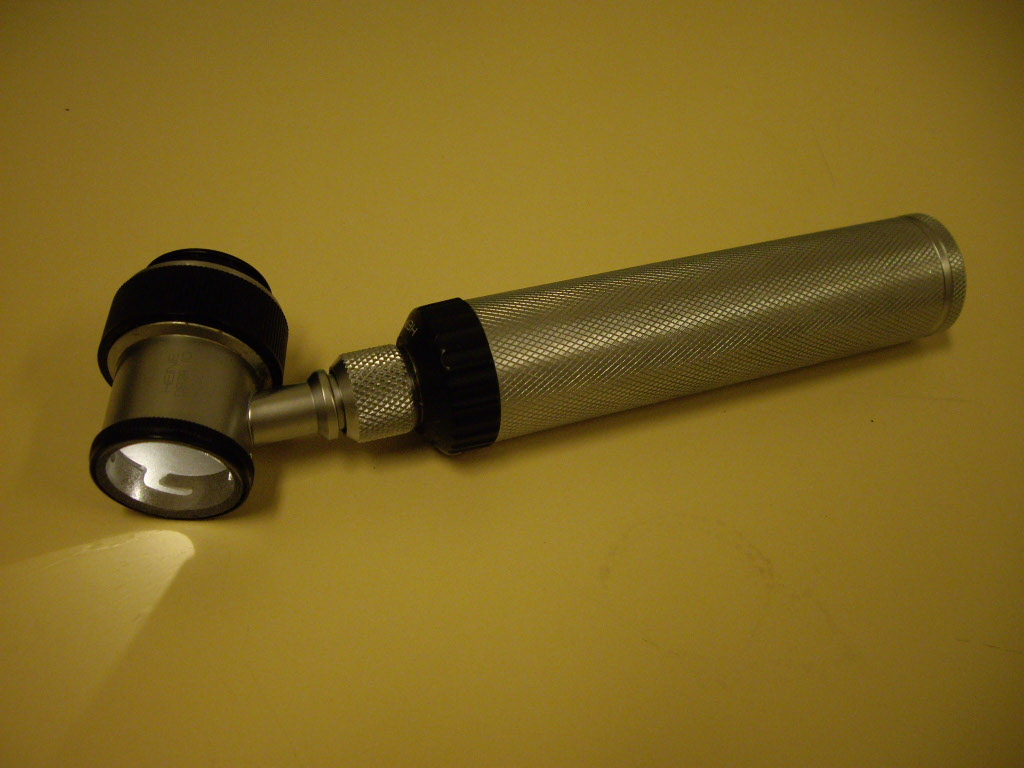 Dermatoscope (Heine, delta-10)